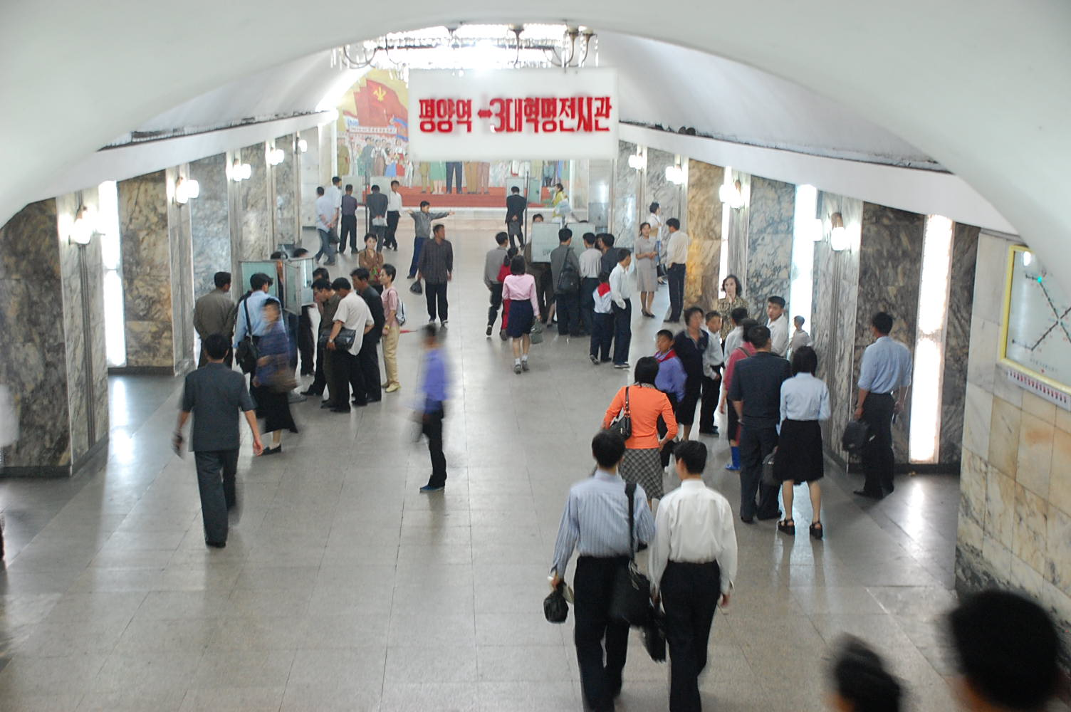 Центральный зал станции метро "Понгва", Пхеньян